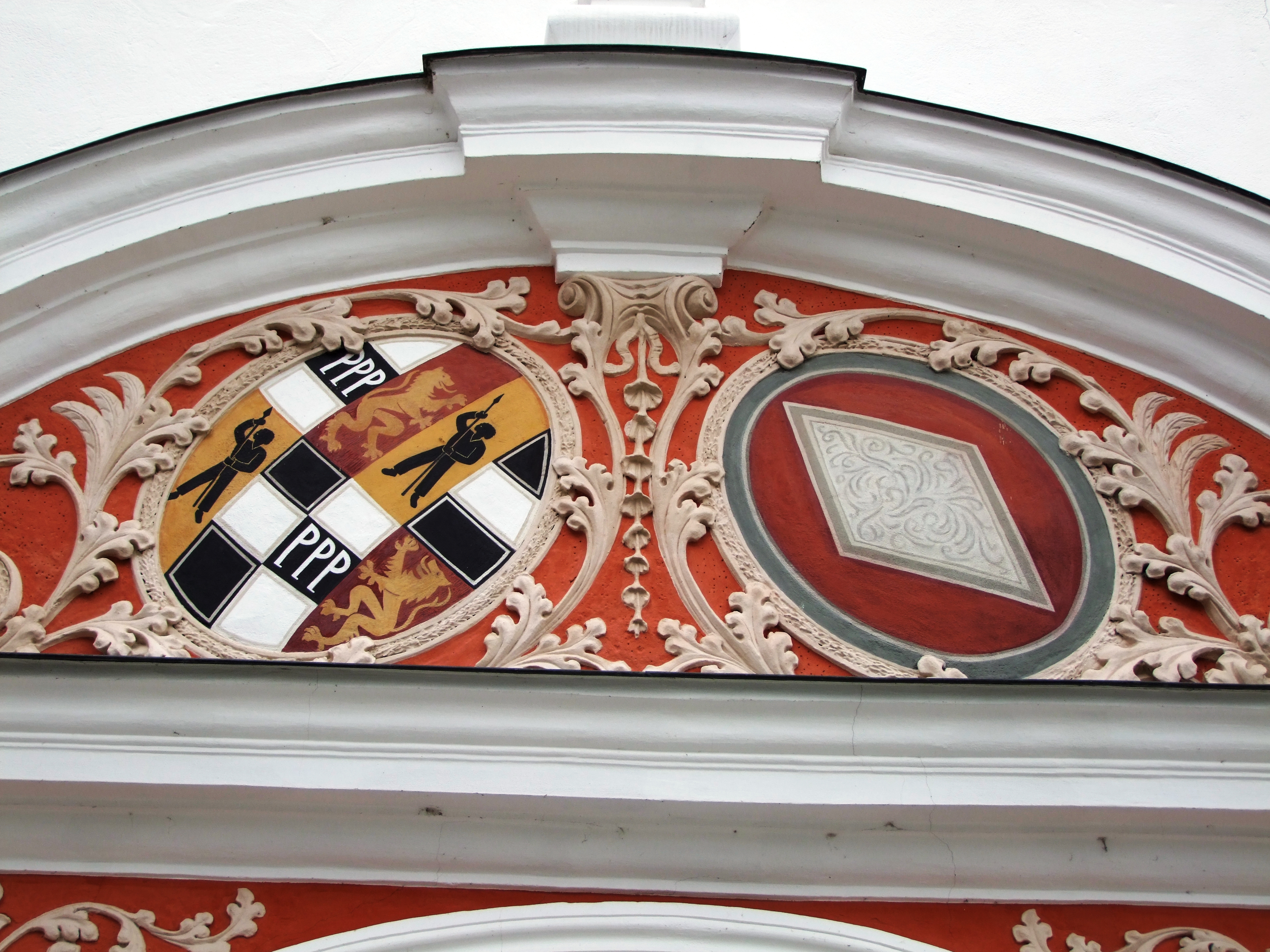 Vöhlinschloß in Illertissen; Wappen am Haupteingang, Allianzwappen des Bauherren Johann Joseph Vöhlin d. Ä. und seiner Frau Maria Louise von Grafeneck